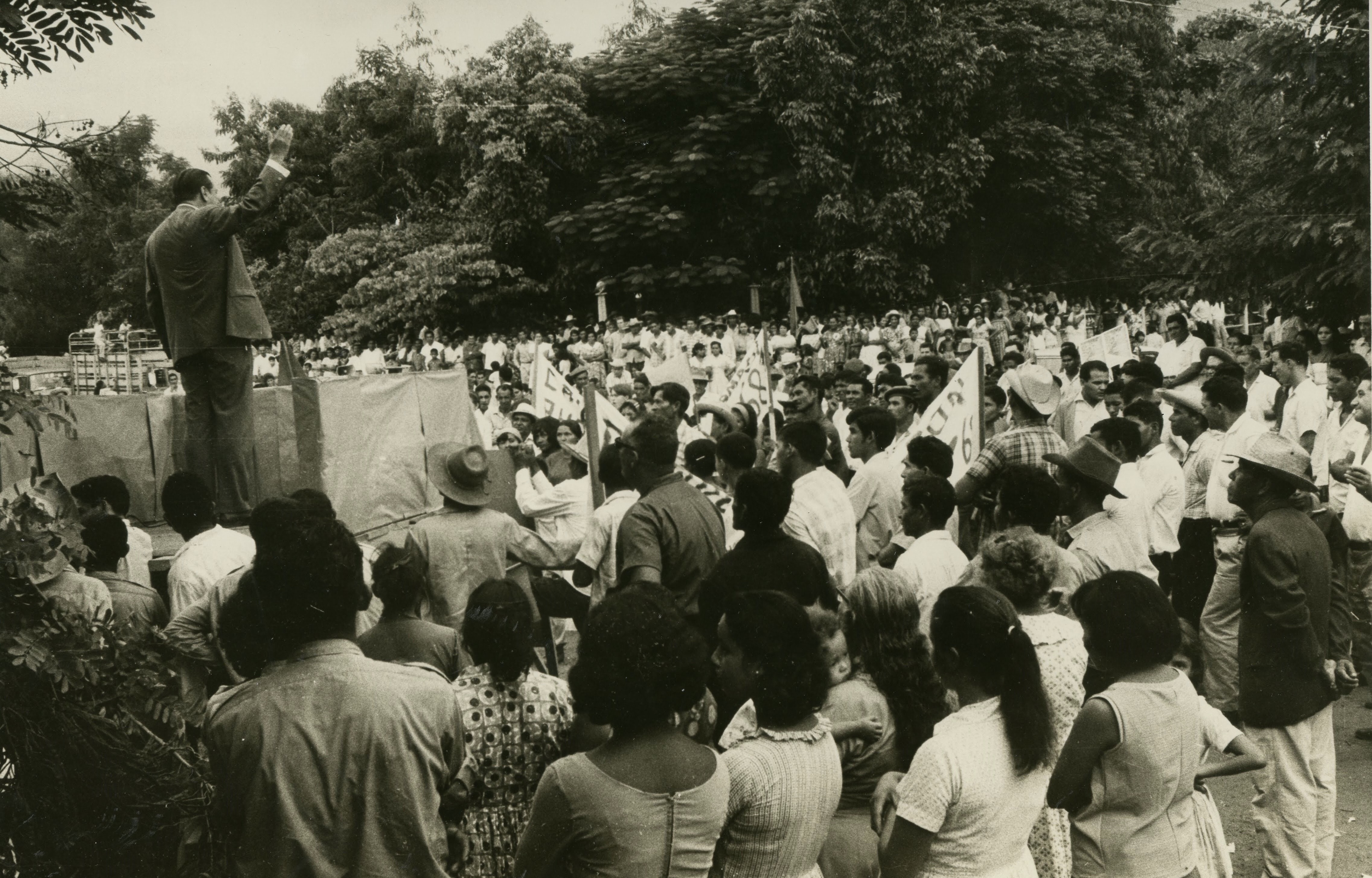 El político venezolano Rafael Caldera durante un mitin en San José de Guaribe, estado Guárico.